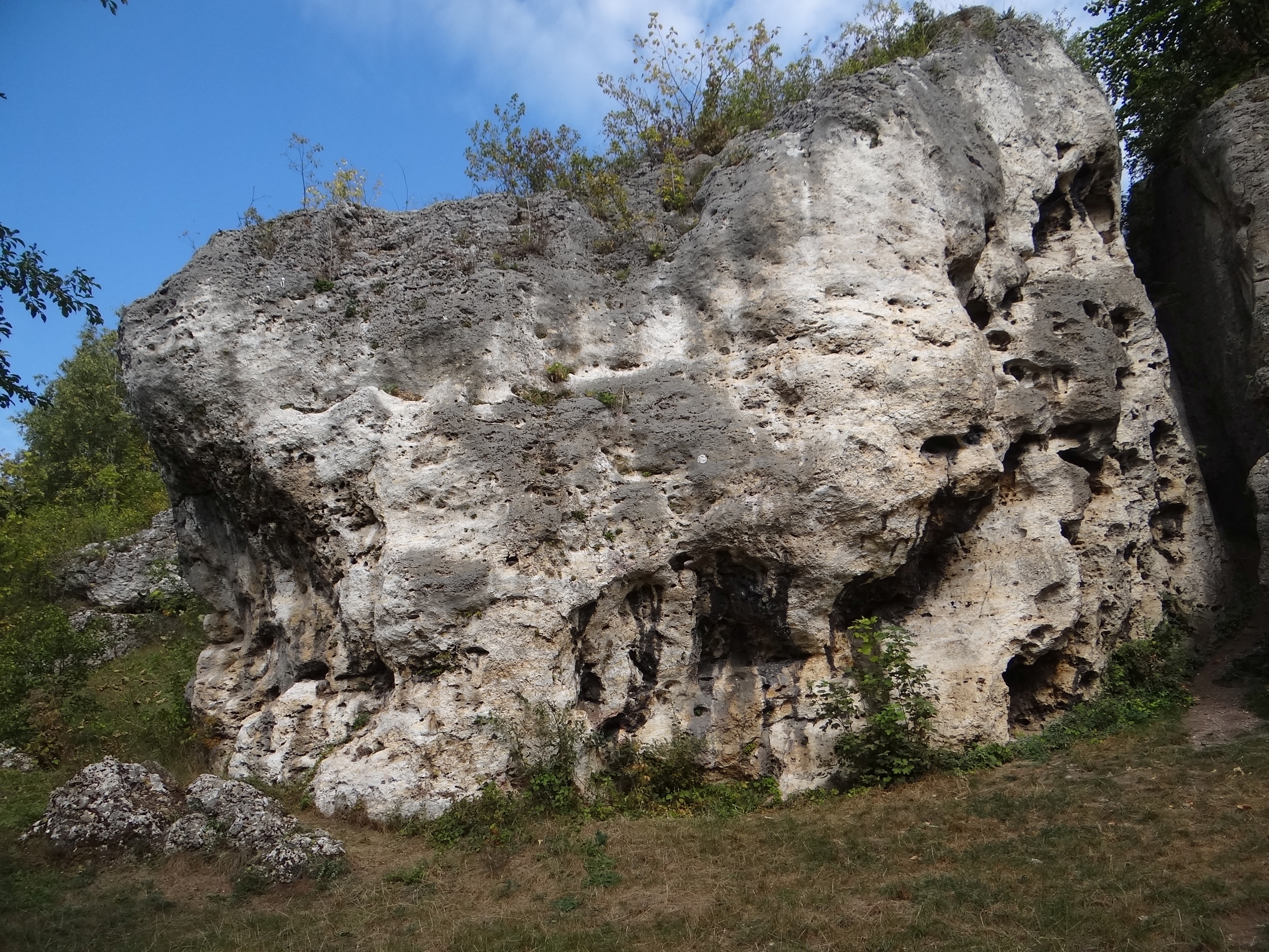 Skała Ule w Łutowcach